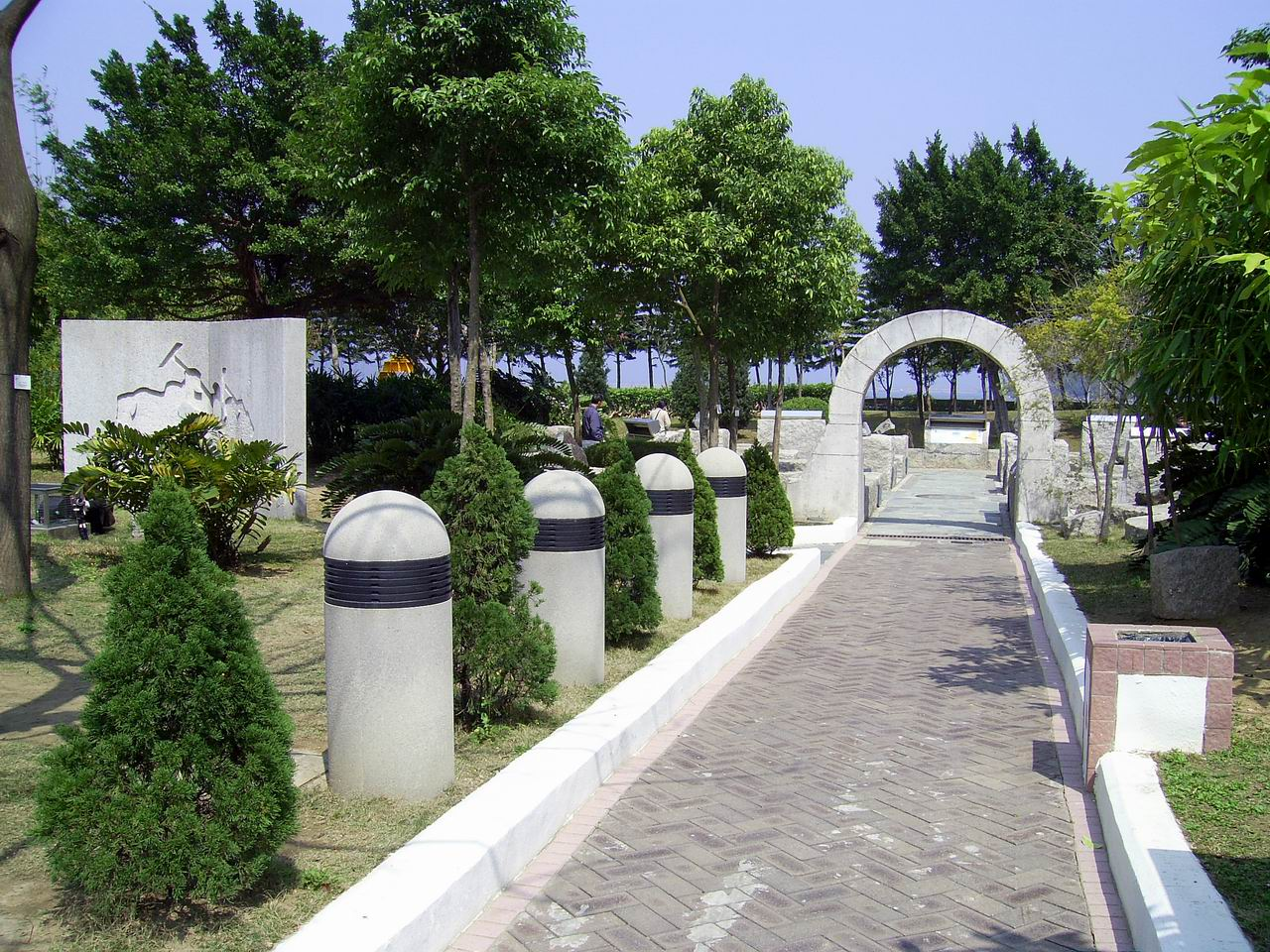 馬鞍山公園採礦歷史展覽